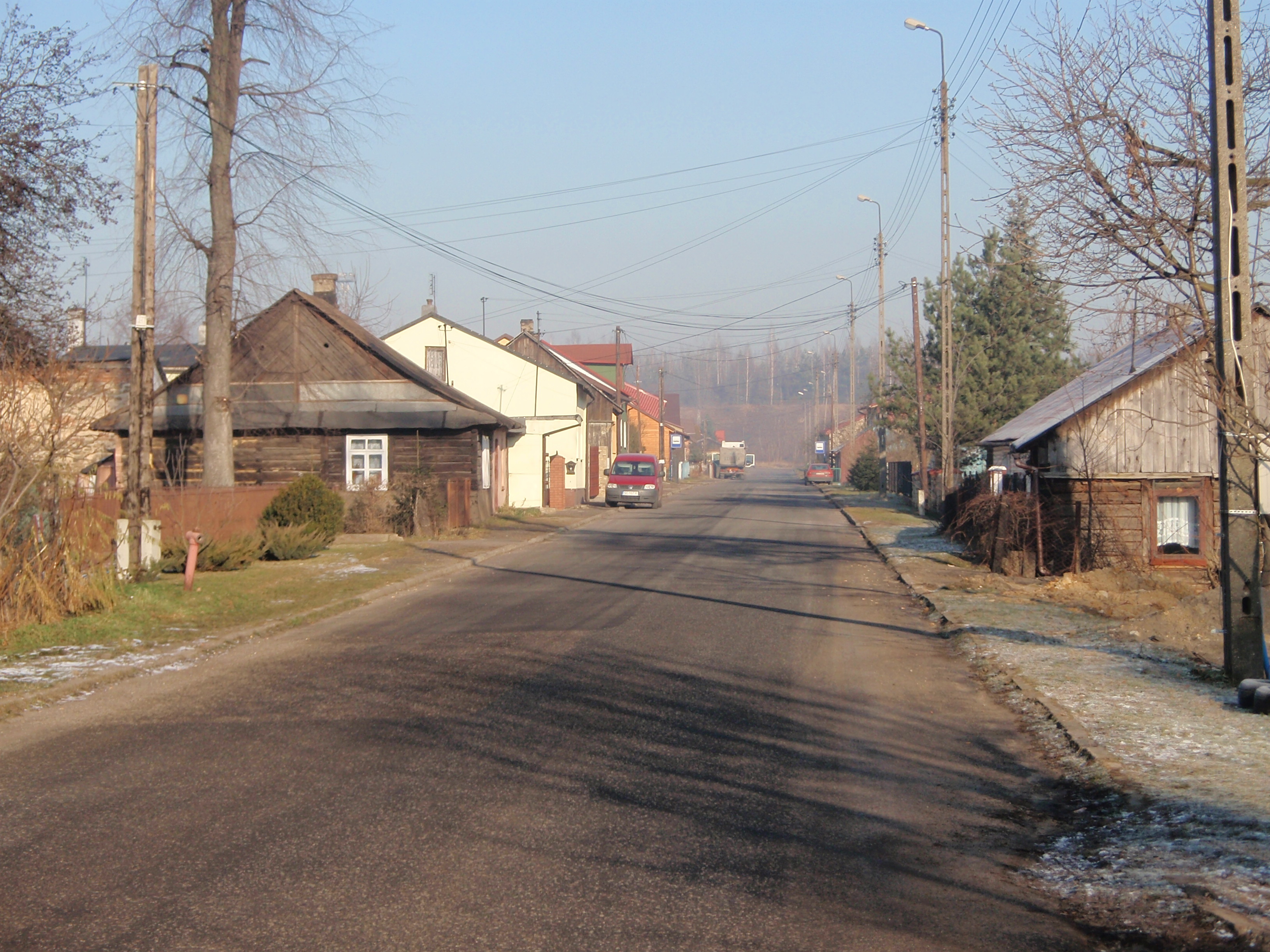 Ul. Zakawie w Dąbrowie Górniczej, woj. śląskie